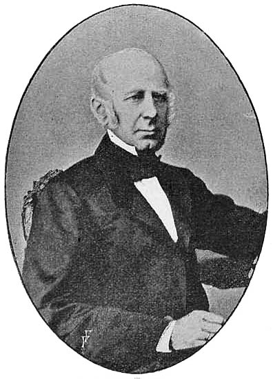 Carl Olof Cronstedt d.y.